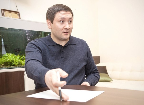 Петро Щербина - політтехнолог, медіа-консультант, керуючий партнер PR-агентства "Media Brand"